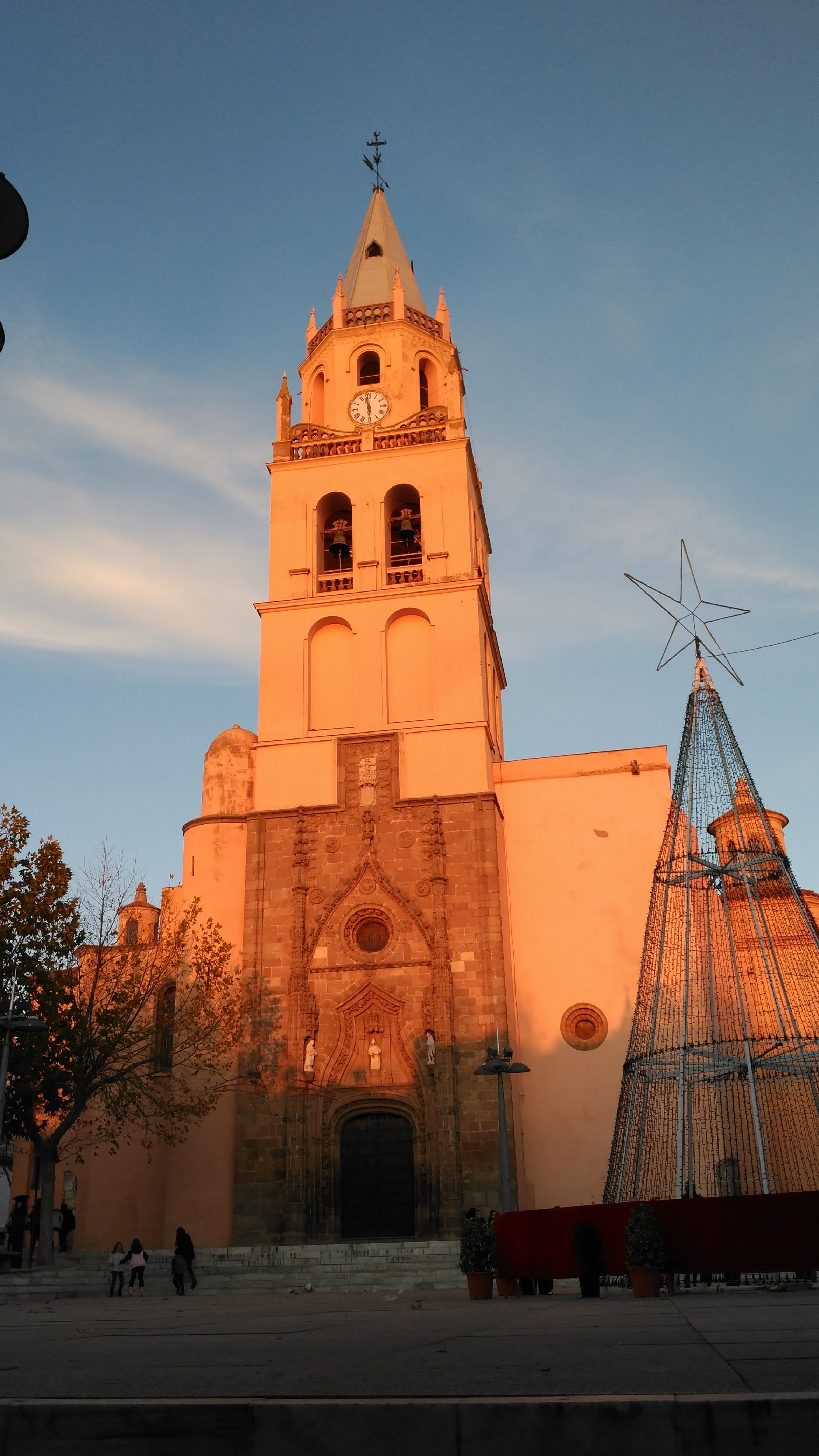 Parroquia de Santa Maria del Valle de Villafranca de los Barros